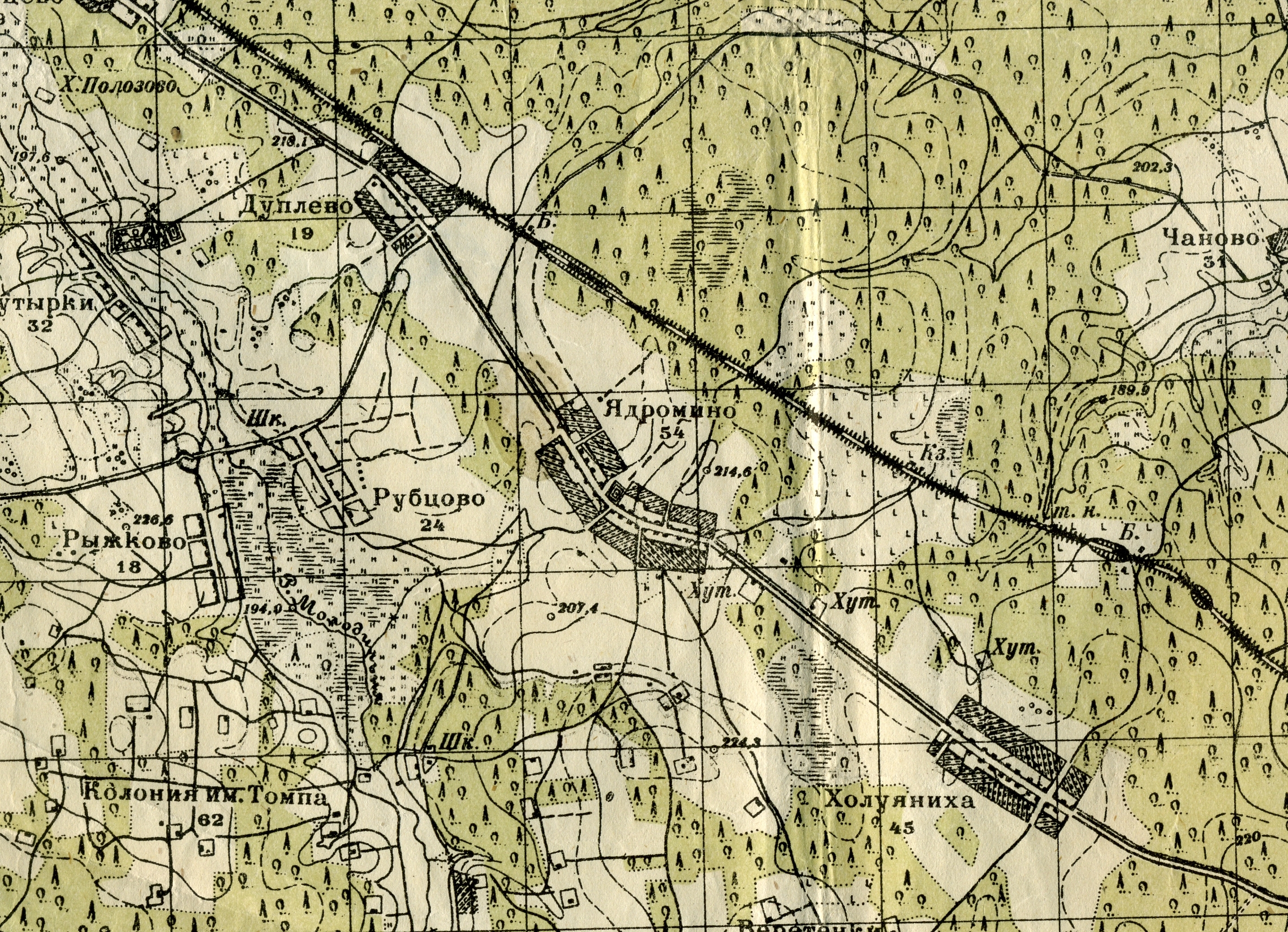 Фрагмент топографической карты РСФСР. Московская область. Лист №37-2-А-Б "Истра" 1922-1928 года. Масштаб 1:50000. Деревня Ядромино и деревни Дуплево, Рубцово, Рыжково, Холуяниха и Колония им. Томпа.